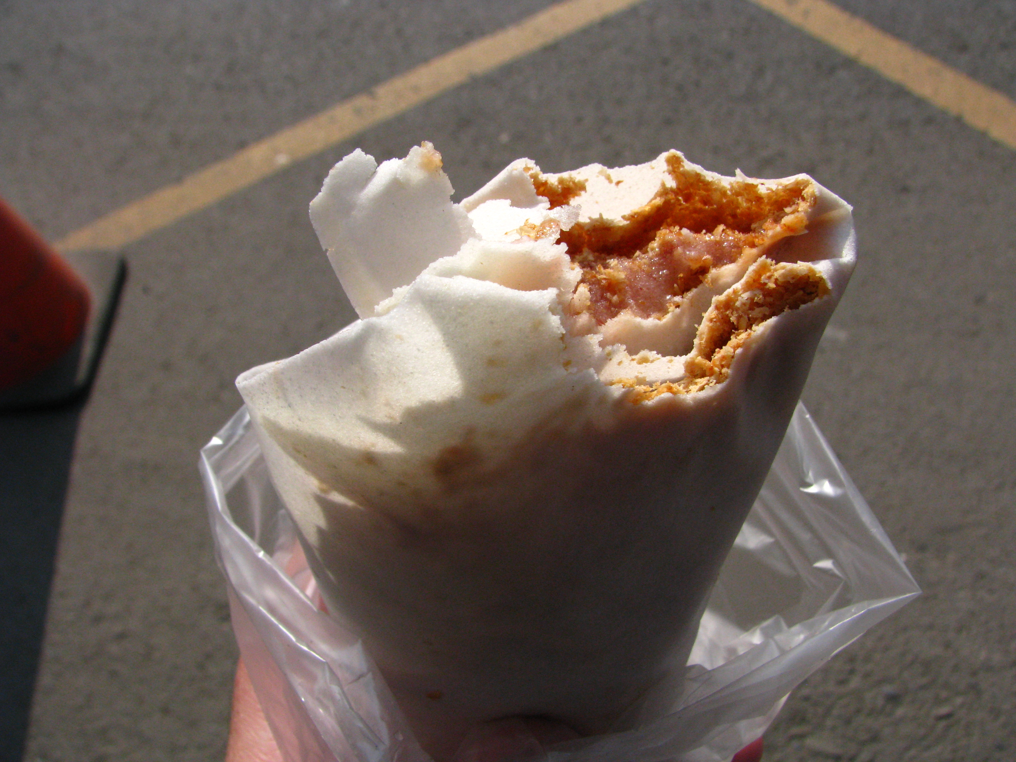 花生卷冰淇淋小吃。